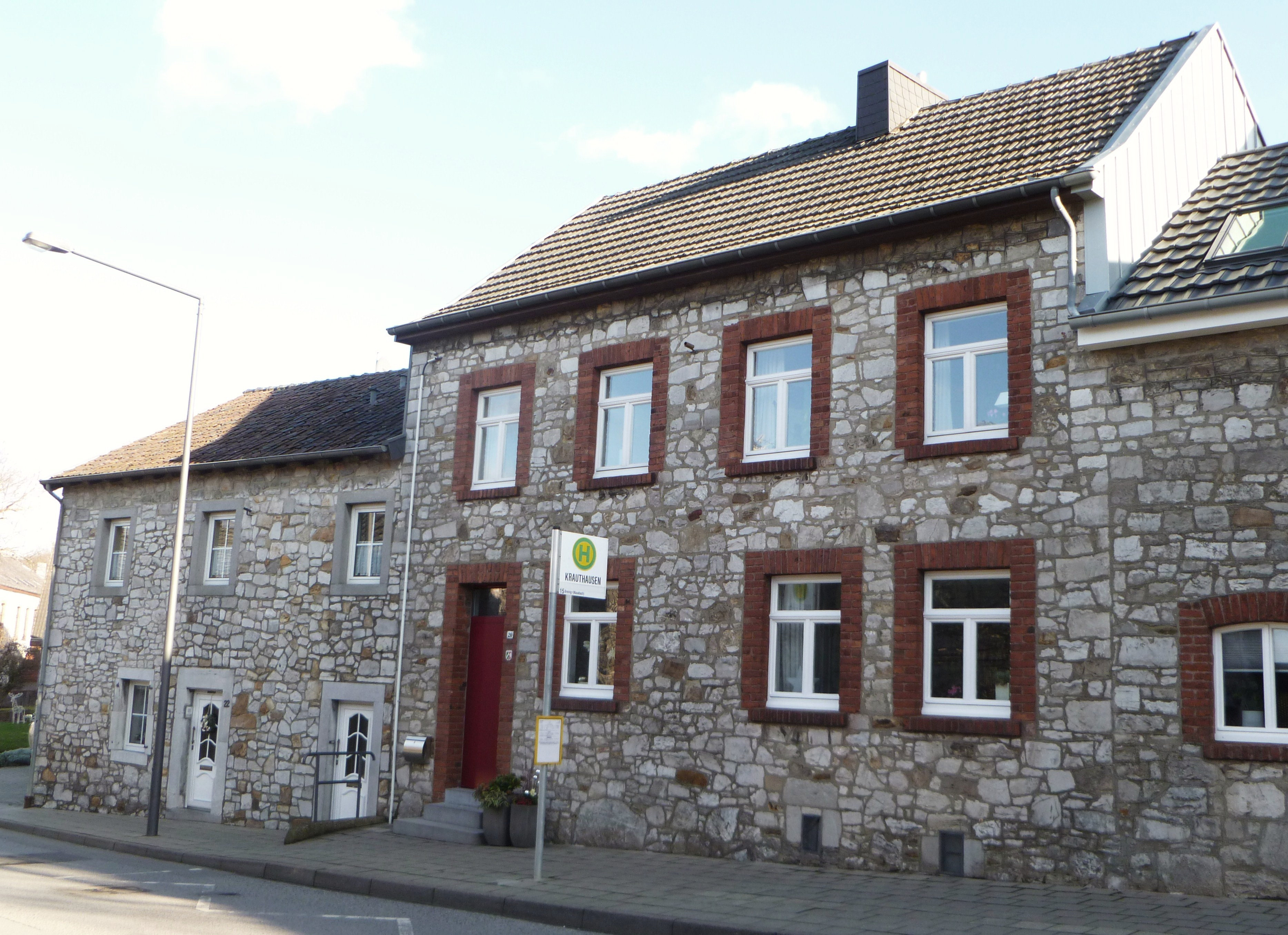 Baudenkmal in Aachen-Brand-Krauthausen